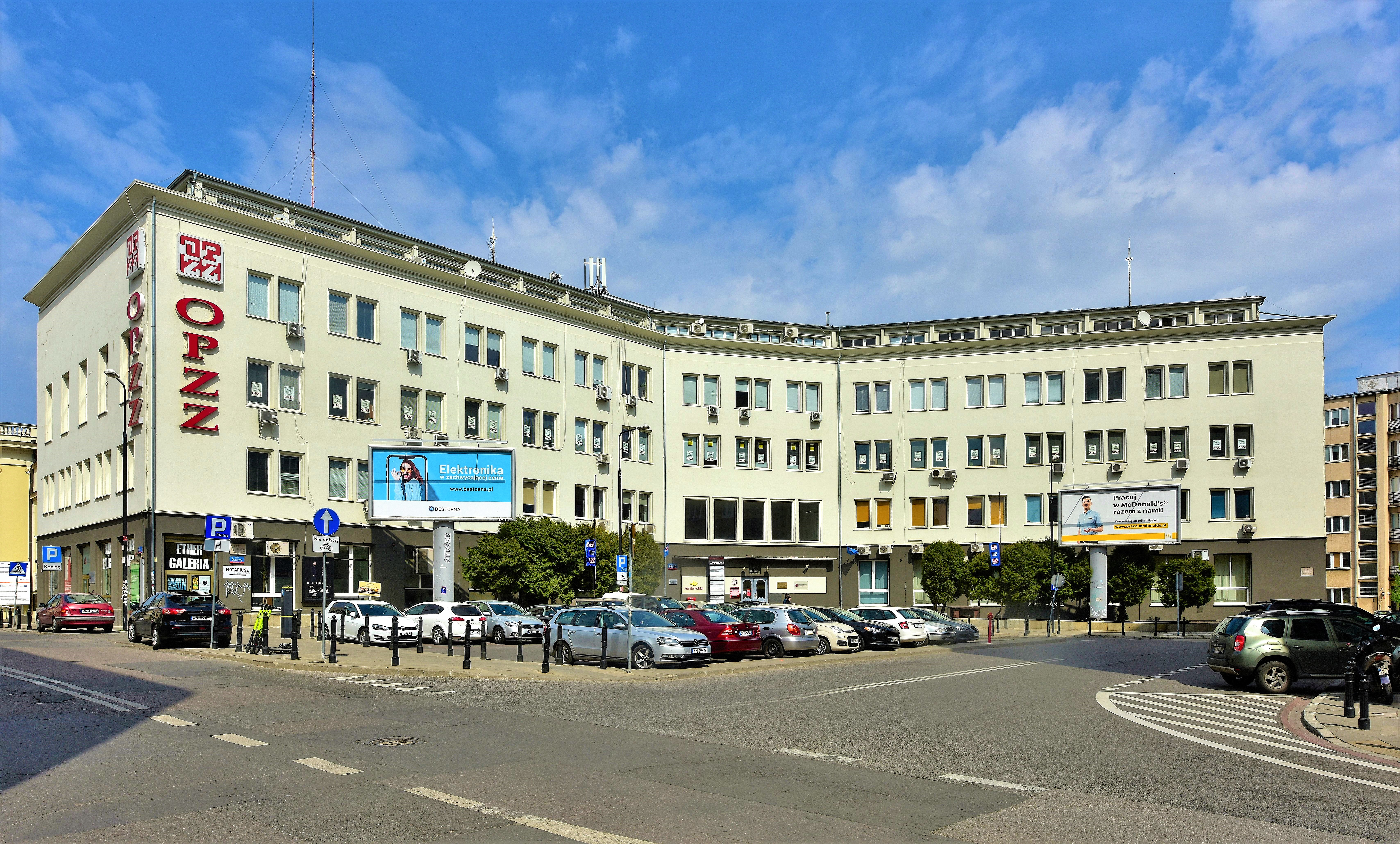 Budynek OPZZ ul. Kopernika 36 w Warszawie